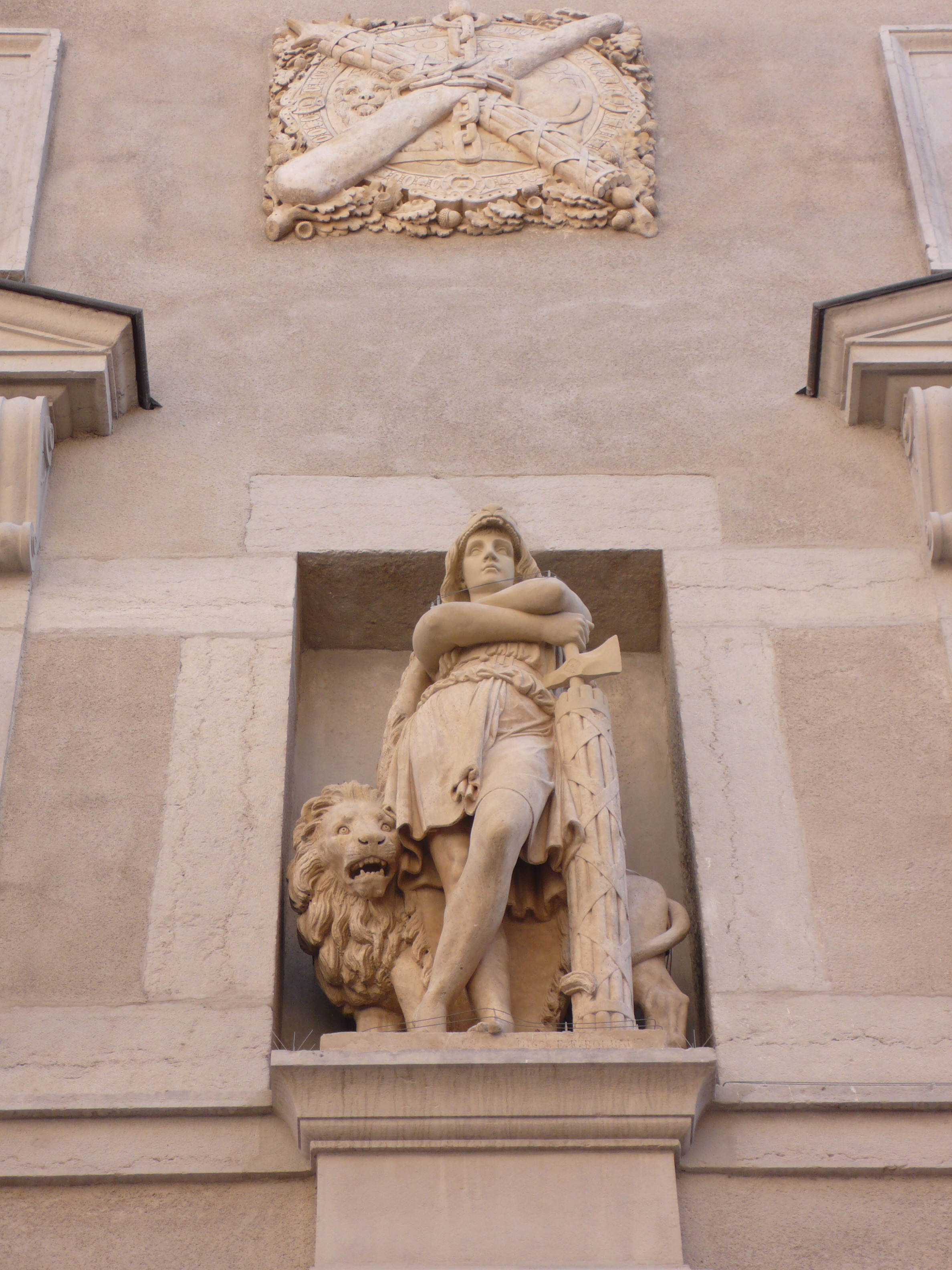 Façade du Palais de justice historique de Lyon, rue Saint-Jean (Vieux Lyon, F-69005) .